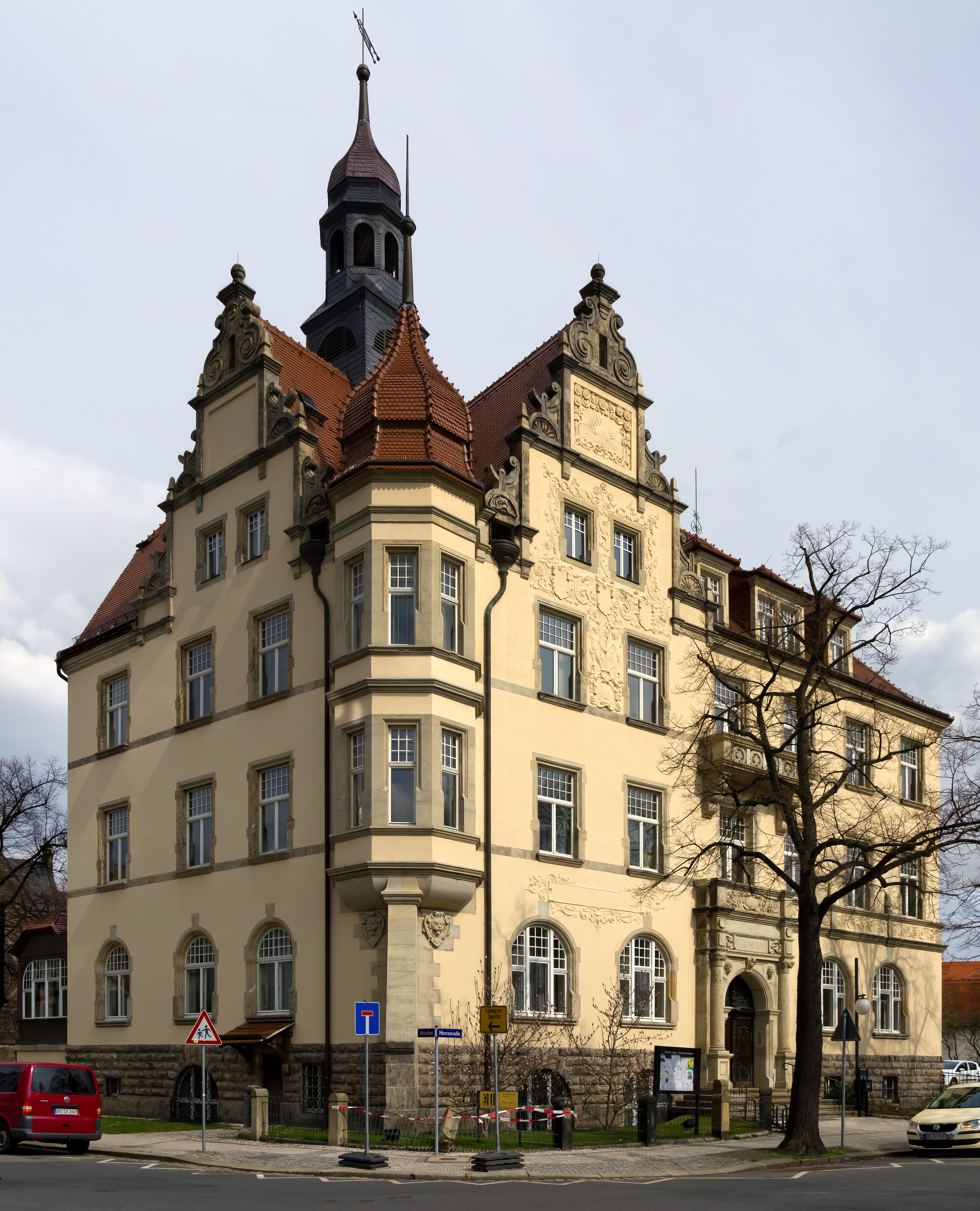 Rathaus Leuben, Dresden (Rathaus Leuben) Rathaus Leuben korrekt entzerrt. Das Gebäude sieht so aus, die Lampe vorm Eingang ist in der Realität eiförmig.